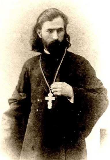 Русский священник и политический деятель Георгий Аполлонович Гапон (1870-1906)